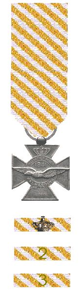 Vliegerskruis Nederland 1941 met baton